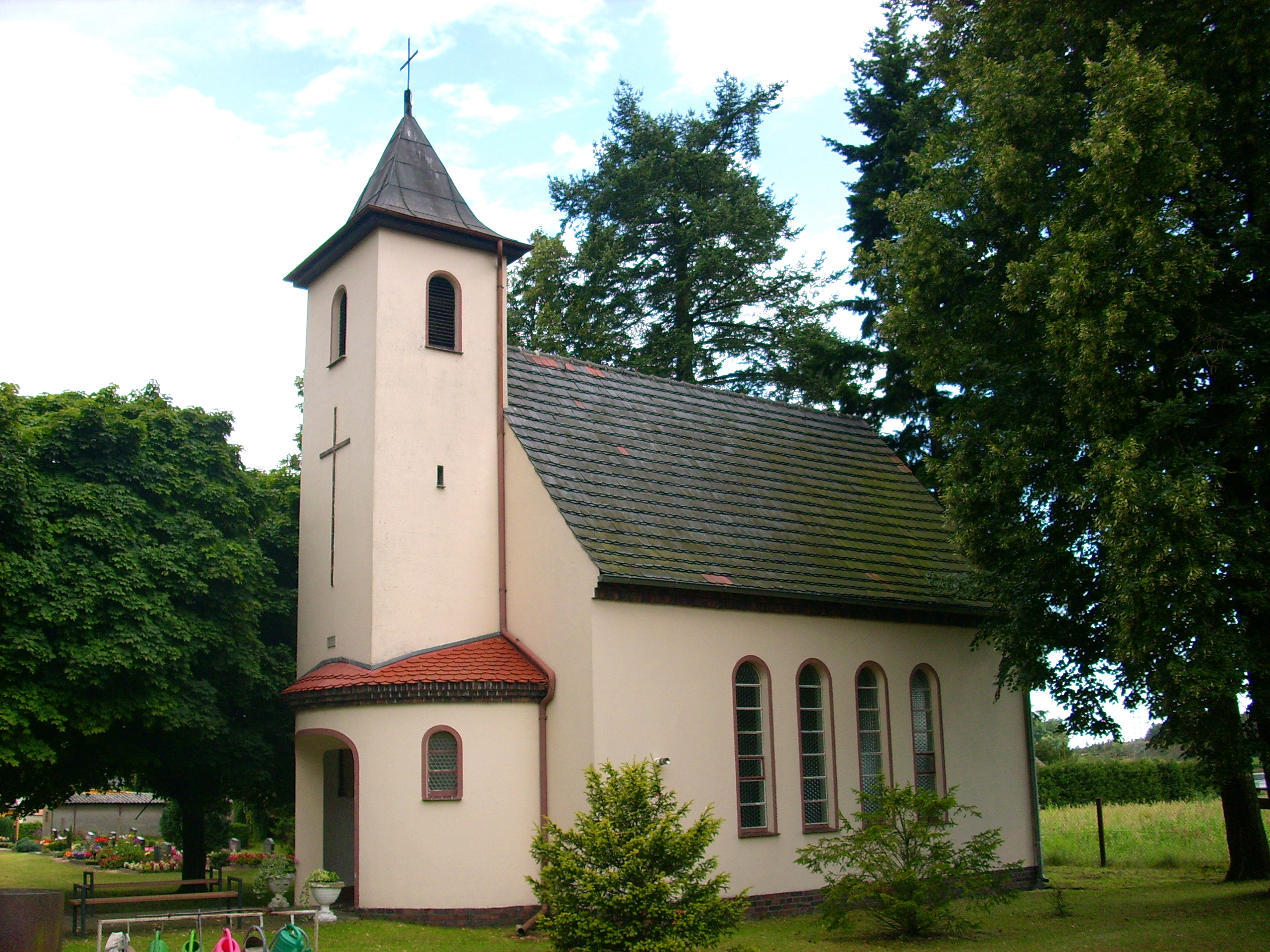 Friedhofskapelle in Weißkollm, Ortsteil von Lohsa Hornjoserbsce: Kapałka na Běłochołmčanskim kěrchowje